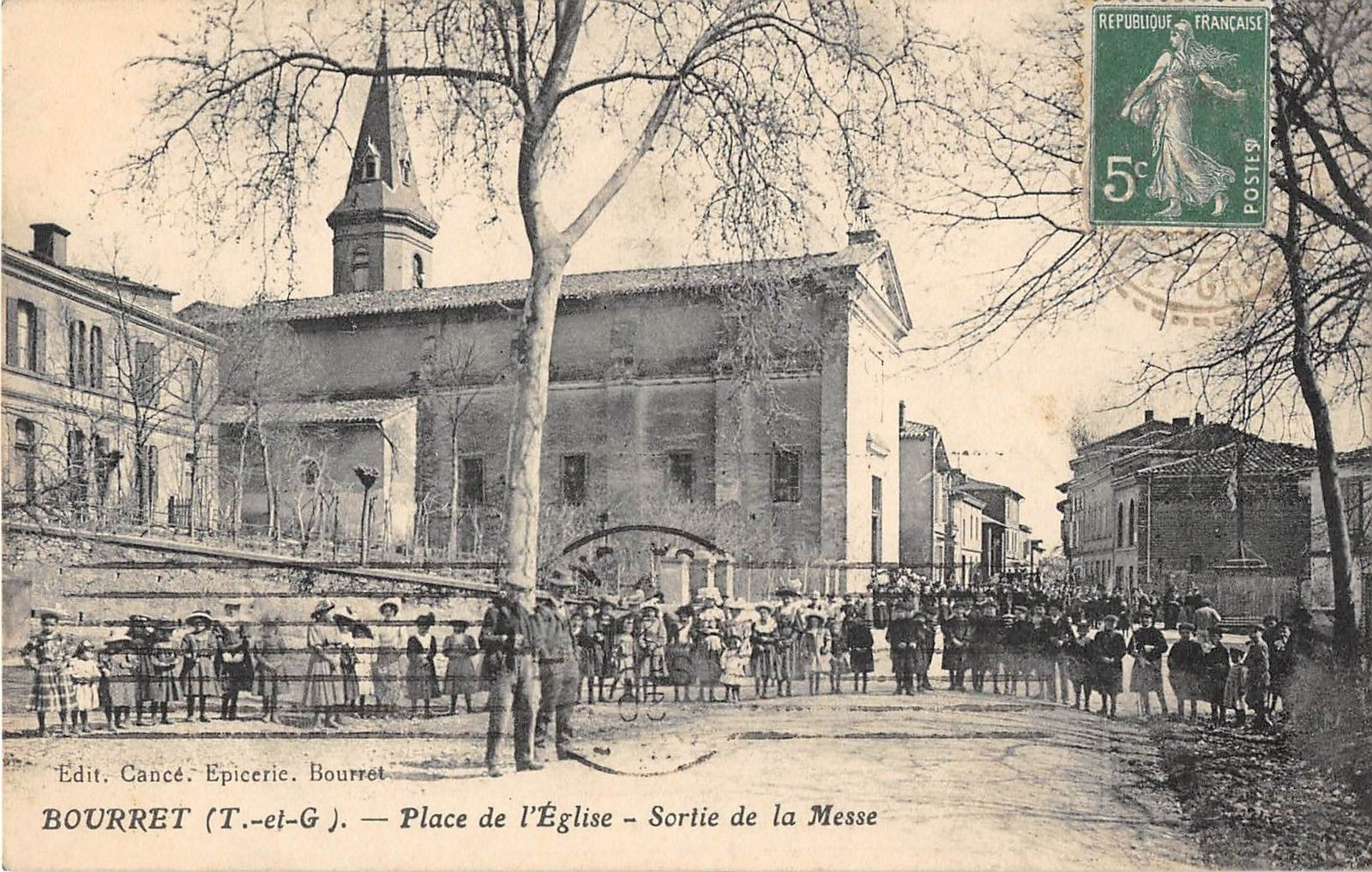 L'église de l'Exaltation-de-la-Sainte-Croix de Bourret et la place du village vers 1905.